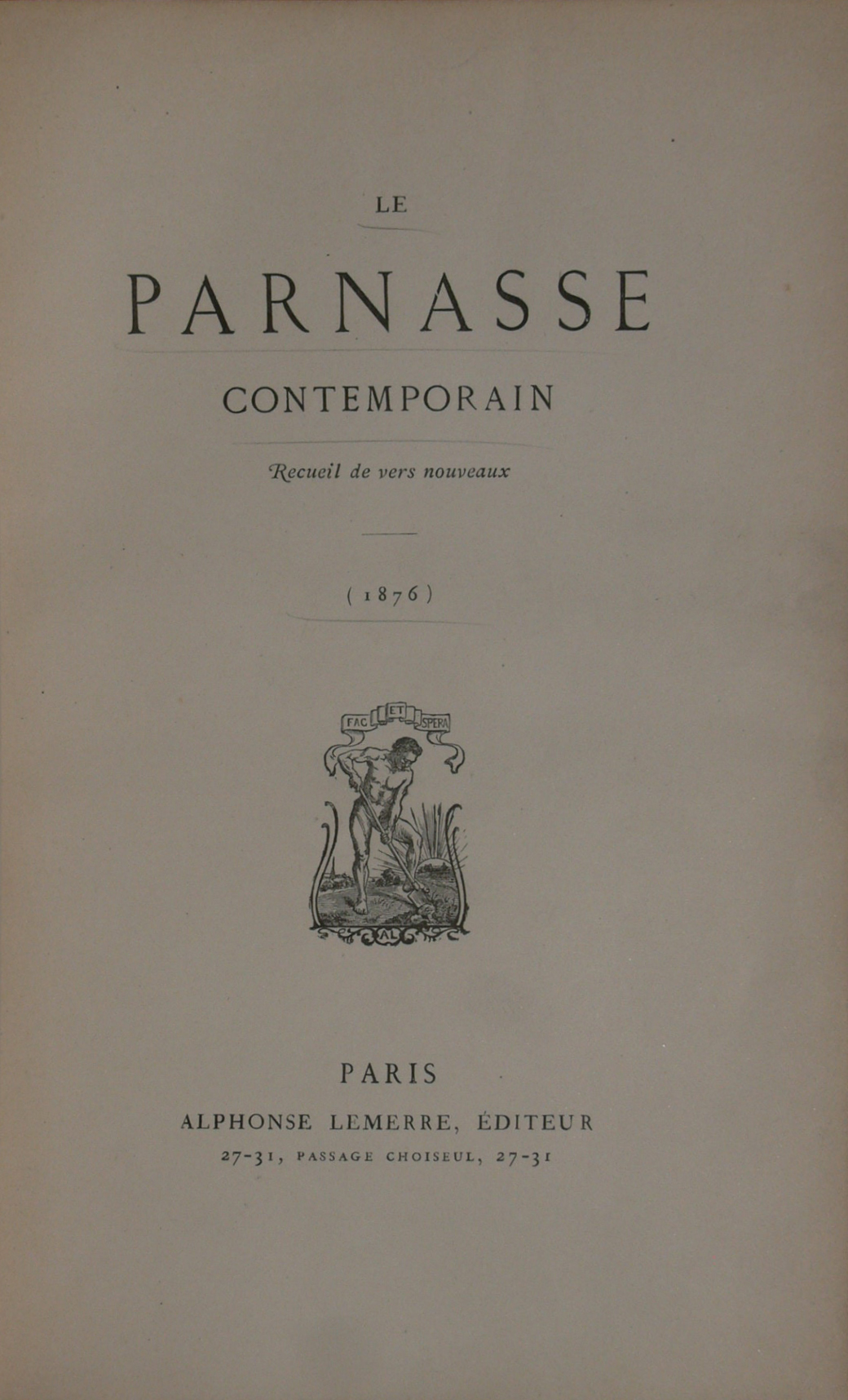 3e Parnasse Contemporain 1876 publié chez Lemerre